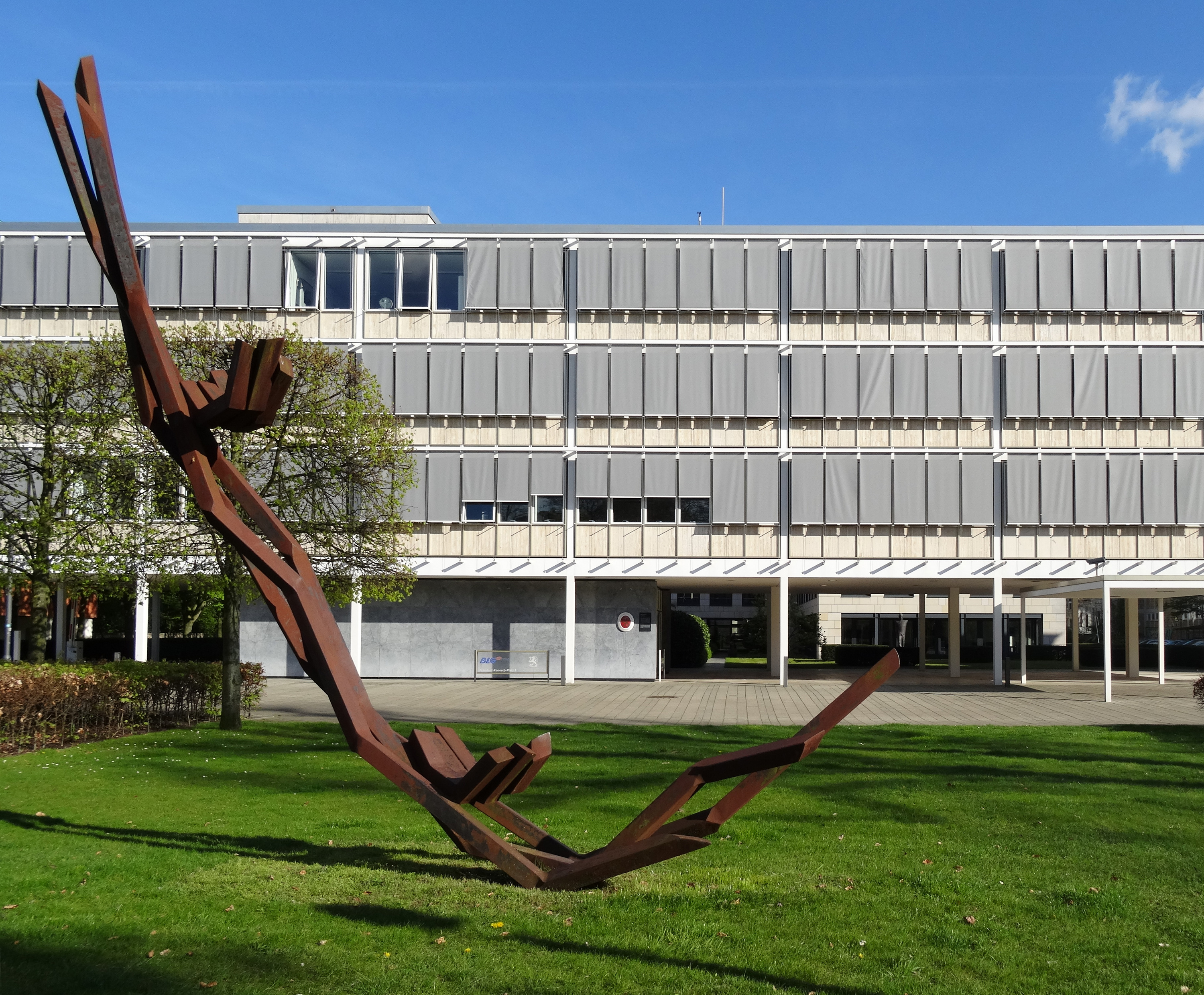 „Romari“ von Robert Schad. Material: Stahl, massiv, Profil 0,01 m; ca. 5,2 m x 5 m x 0,90 m. Errichtet: 1998. Standort: Bremen, Präsident-Kennedy-Platz. Kunst im öffentlichen Raum – ein Bremer Programm. k: kunst im öffentlichen raum bremen